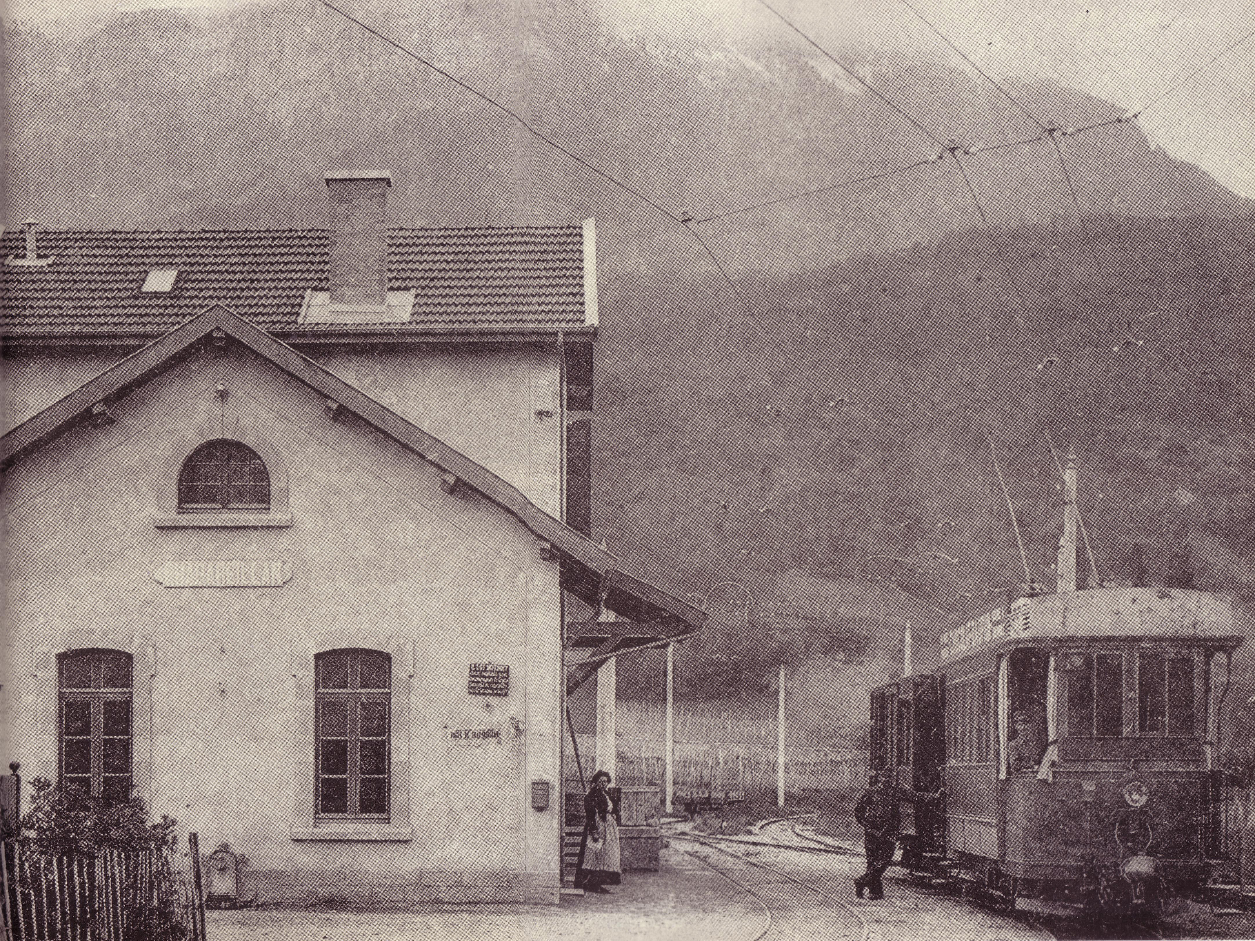 Gare TGC de Chapareillan en 1900